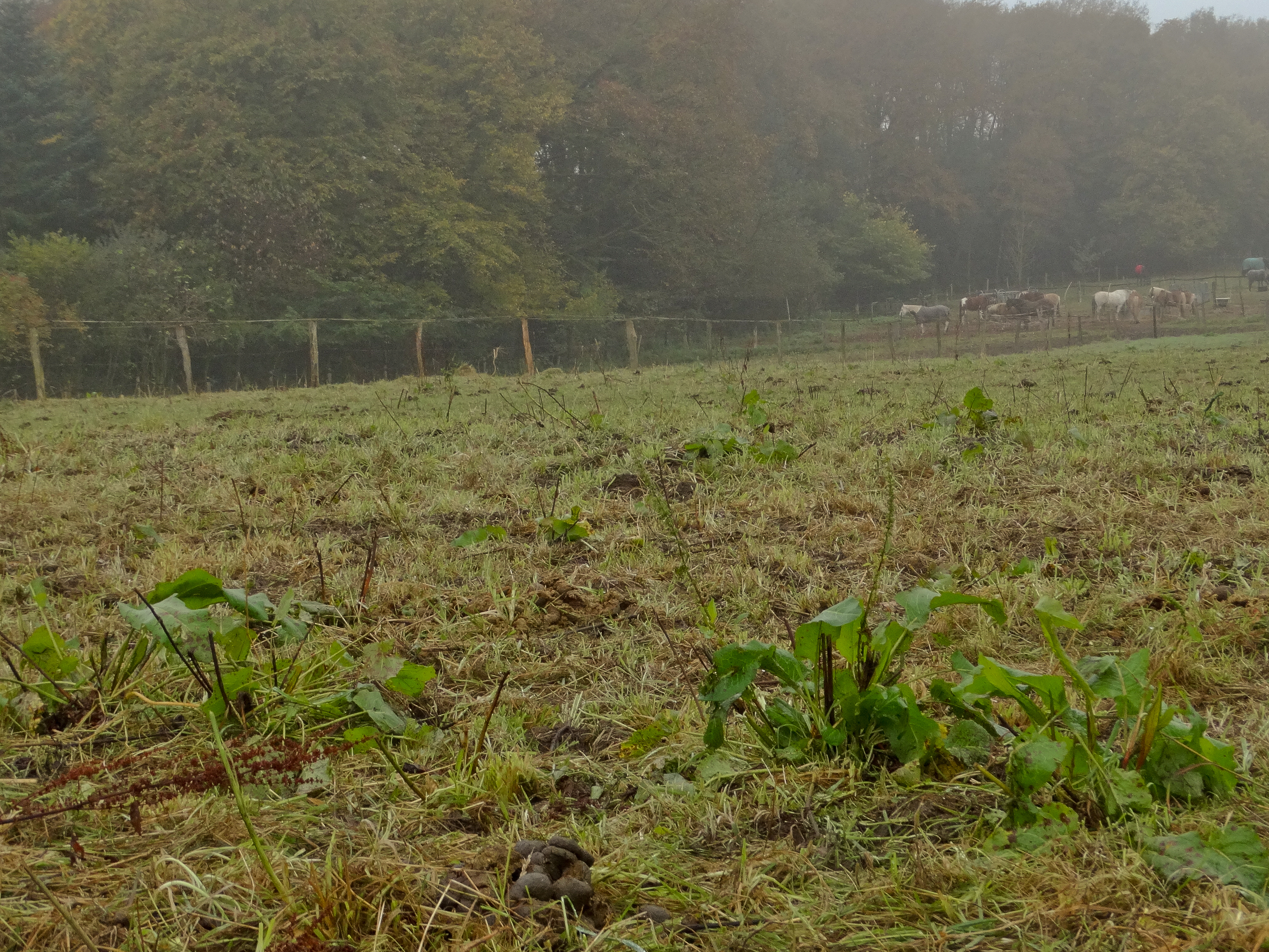 Überweidete Pferdekoppel mit Weideunkräutern (Wuppertal)